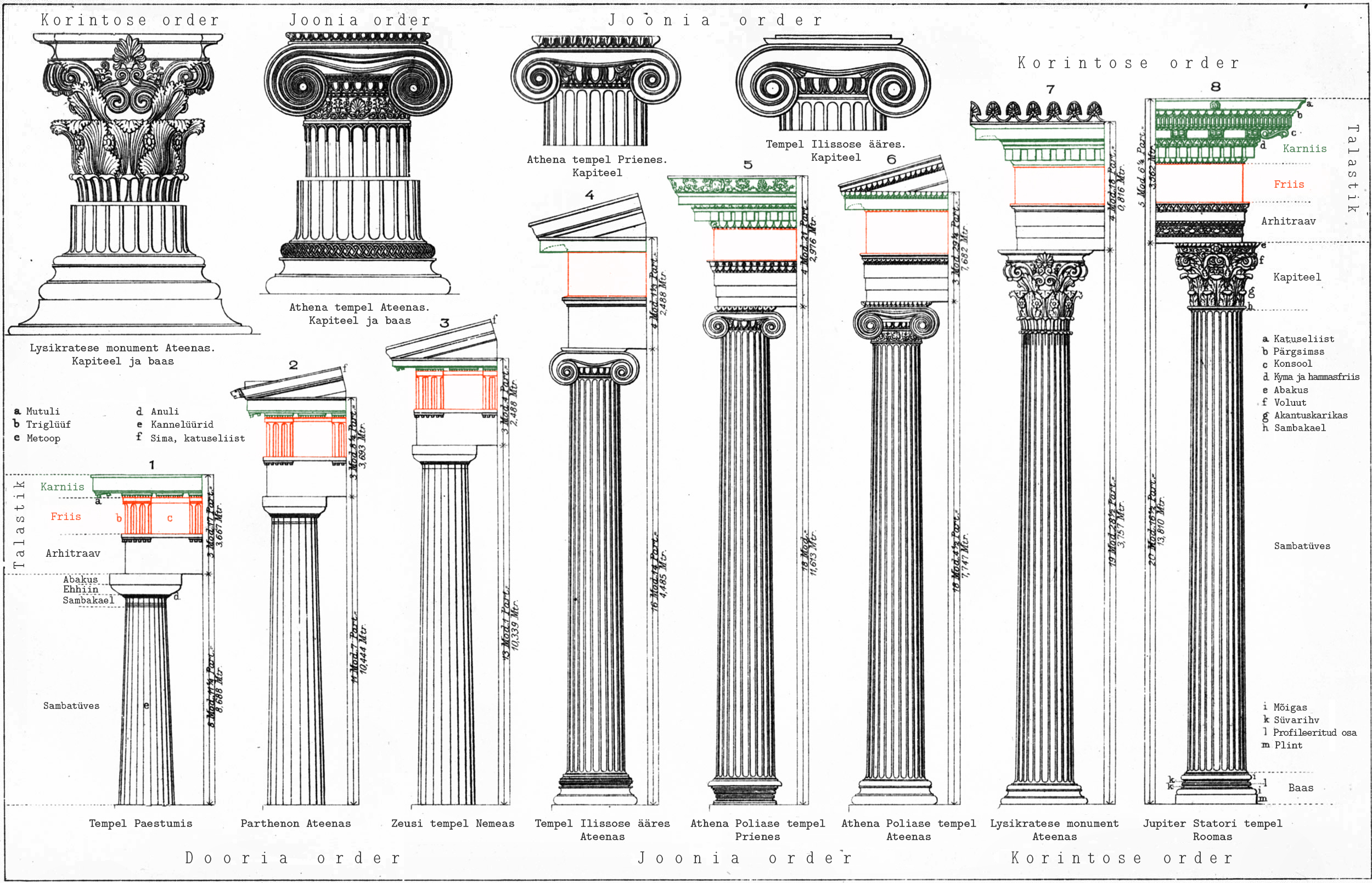 Friis-karniis orderites